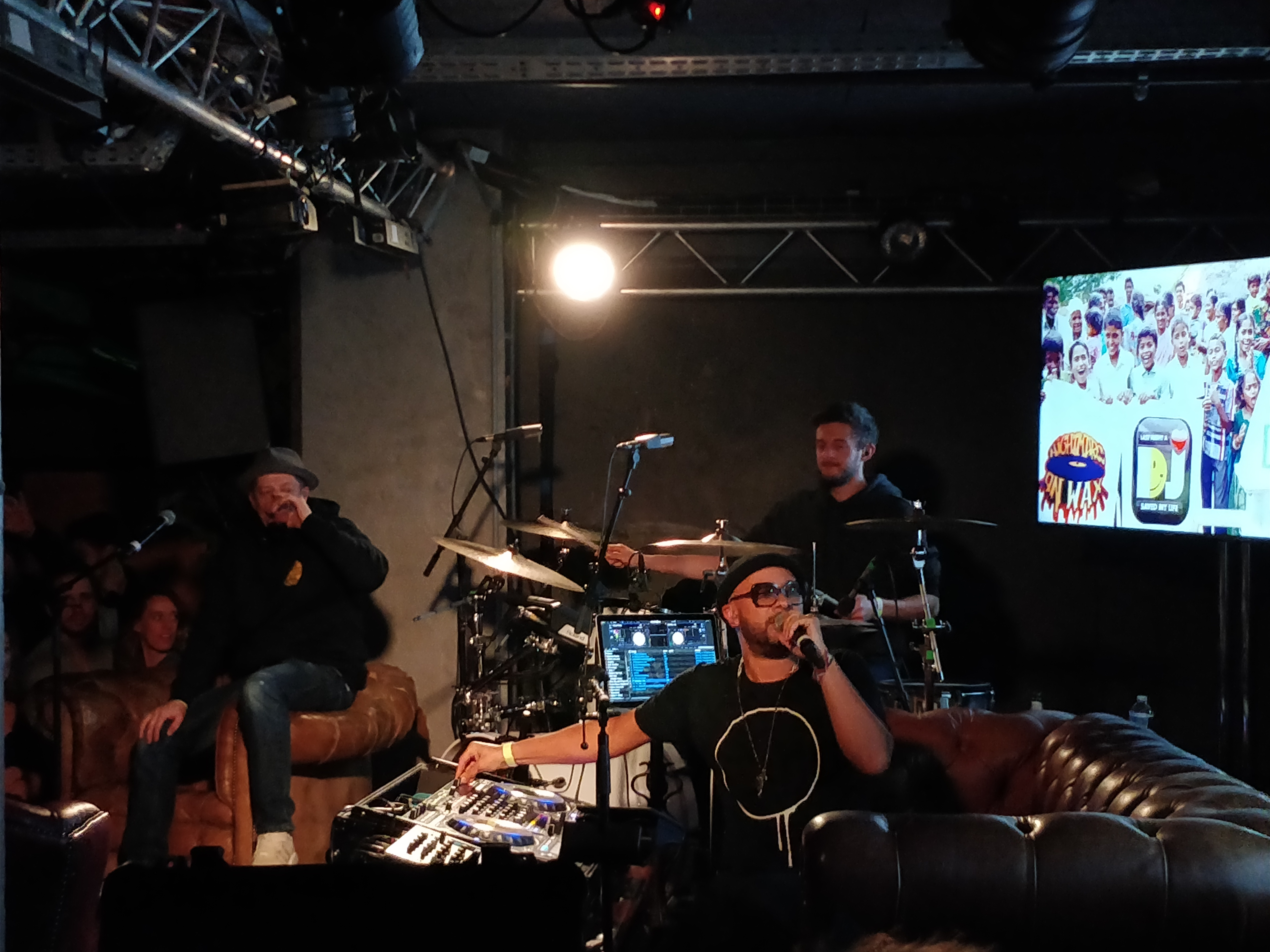 Concert de Nightmares on Wax à La Bellevilloise (15/02/2018)